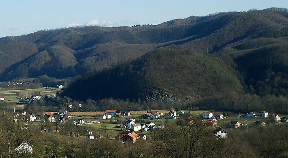 Шкребин Камен гледано са западне стране, са жарковачког гробља